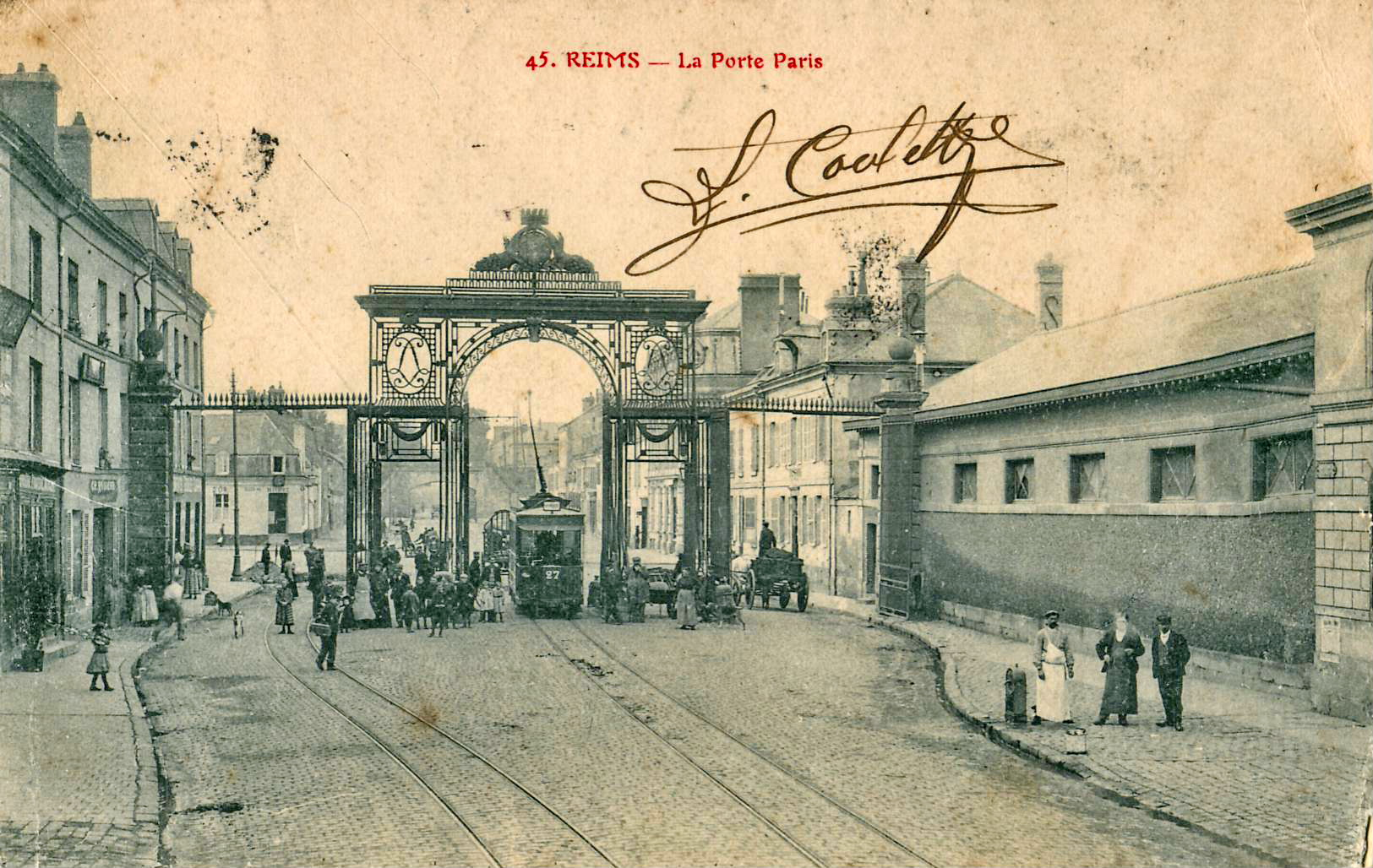 Carte postale ancienne, sans mention d'éditeur, n°45 :REIMS - La Porte Paris